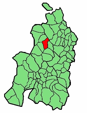 aipaturiko udalerriaren kokapena Nafarroa Beherean